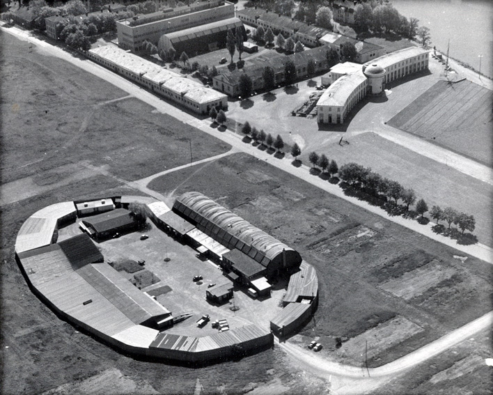 Centrumateljéerna vid Djurgårdsbrunnsvägen intill Sjöhistoriska.